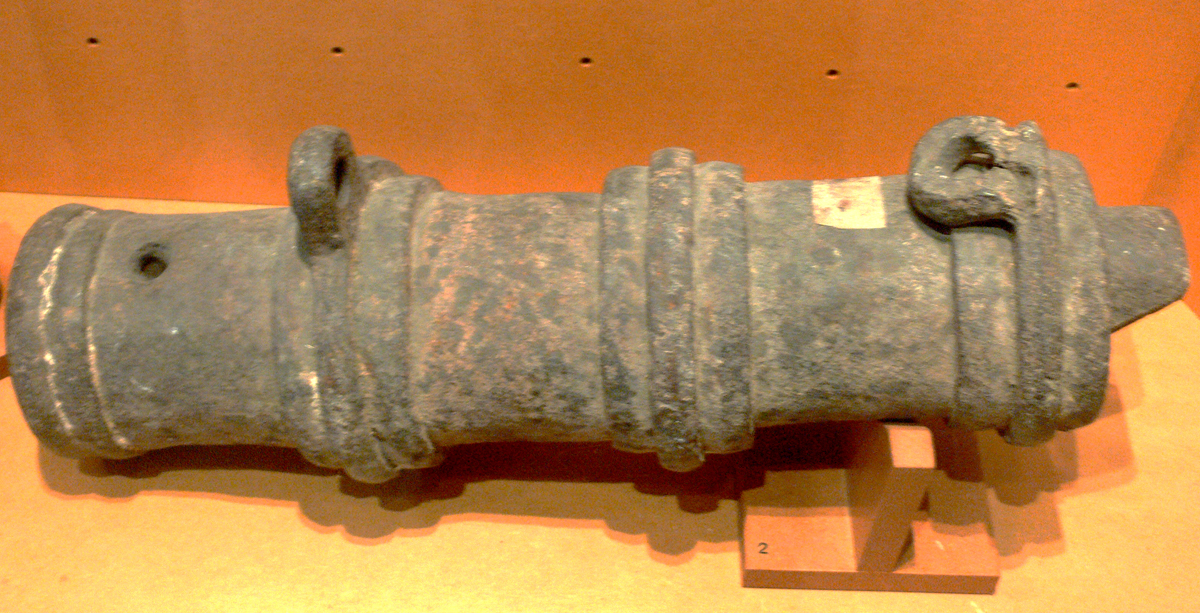 Culasse de canon appartenant à l'artillerie du château médiéval de Vesoul. Vesoul, musée Georges-Garret.